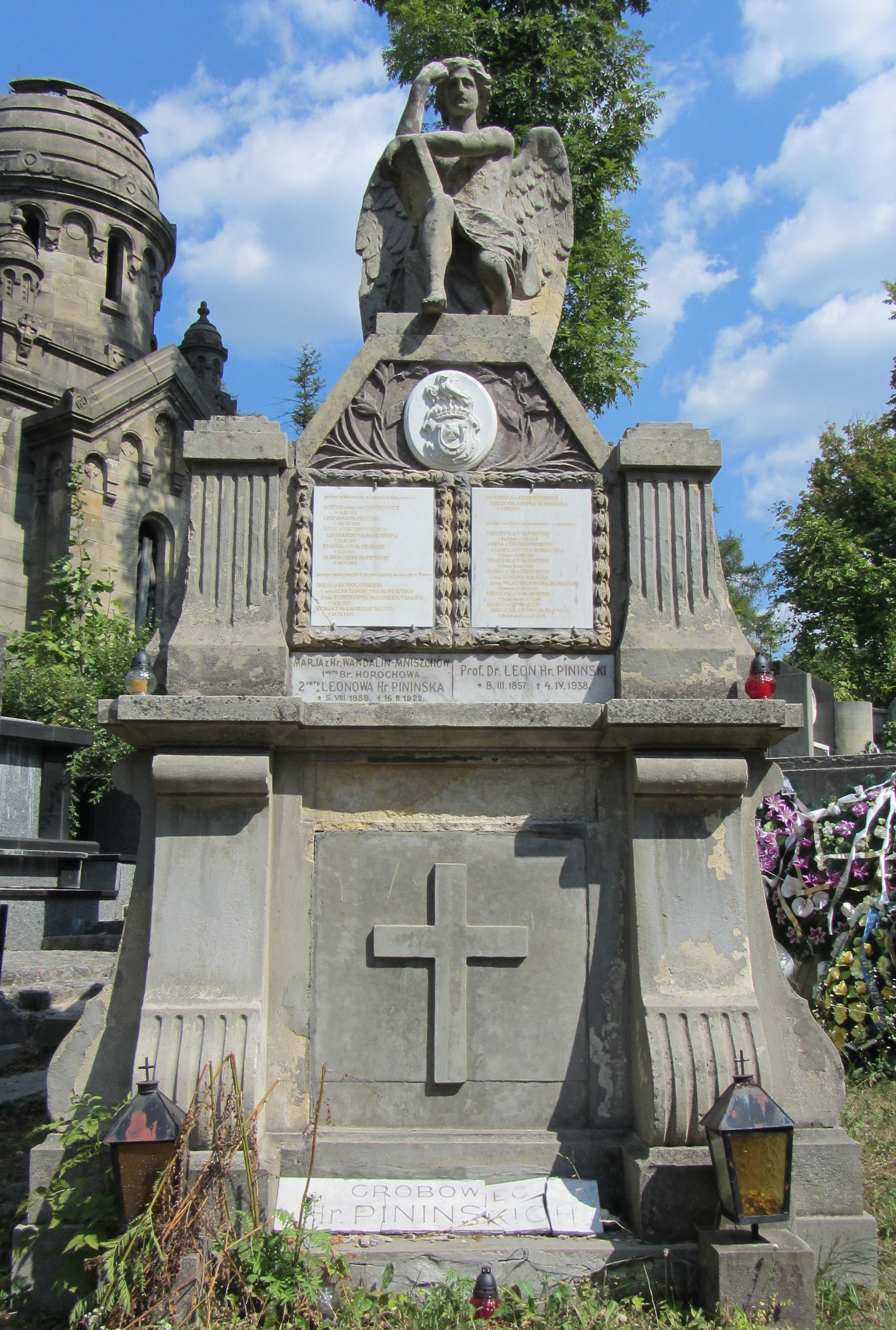 Cmentarz Łyczakowski